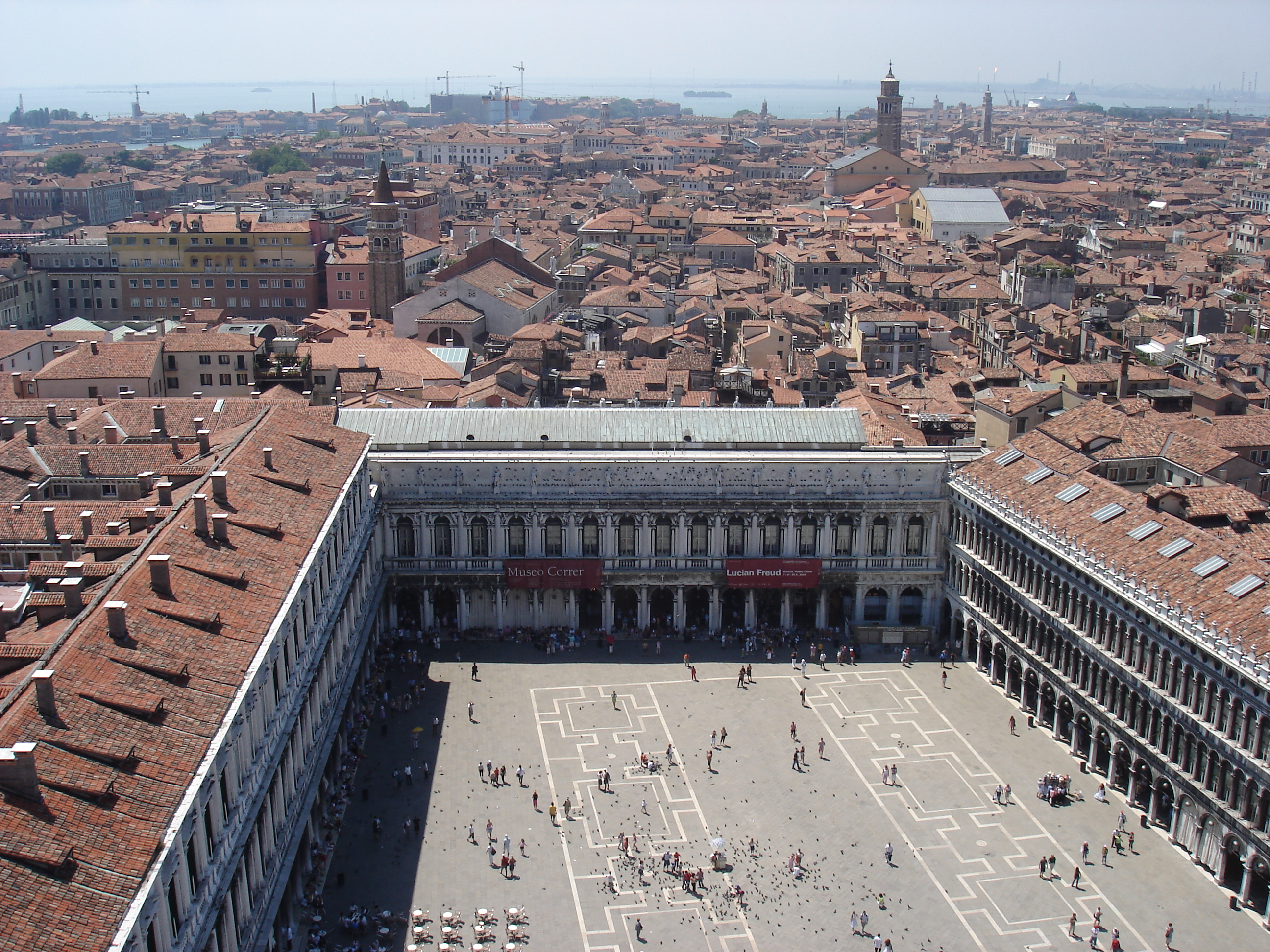 Venice